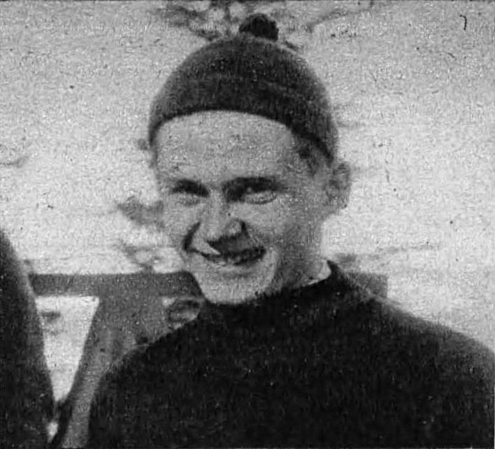 Jan Kula podczas mistrzostw świata FIS w Zakopanem 1939